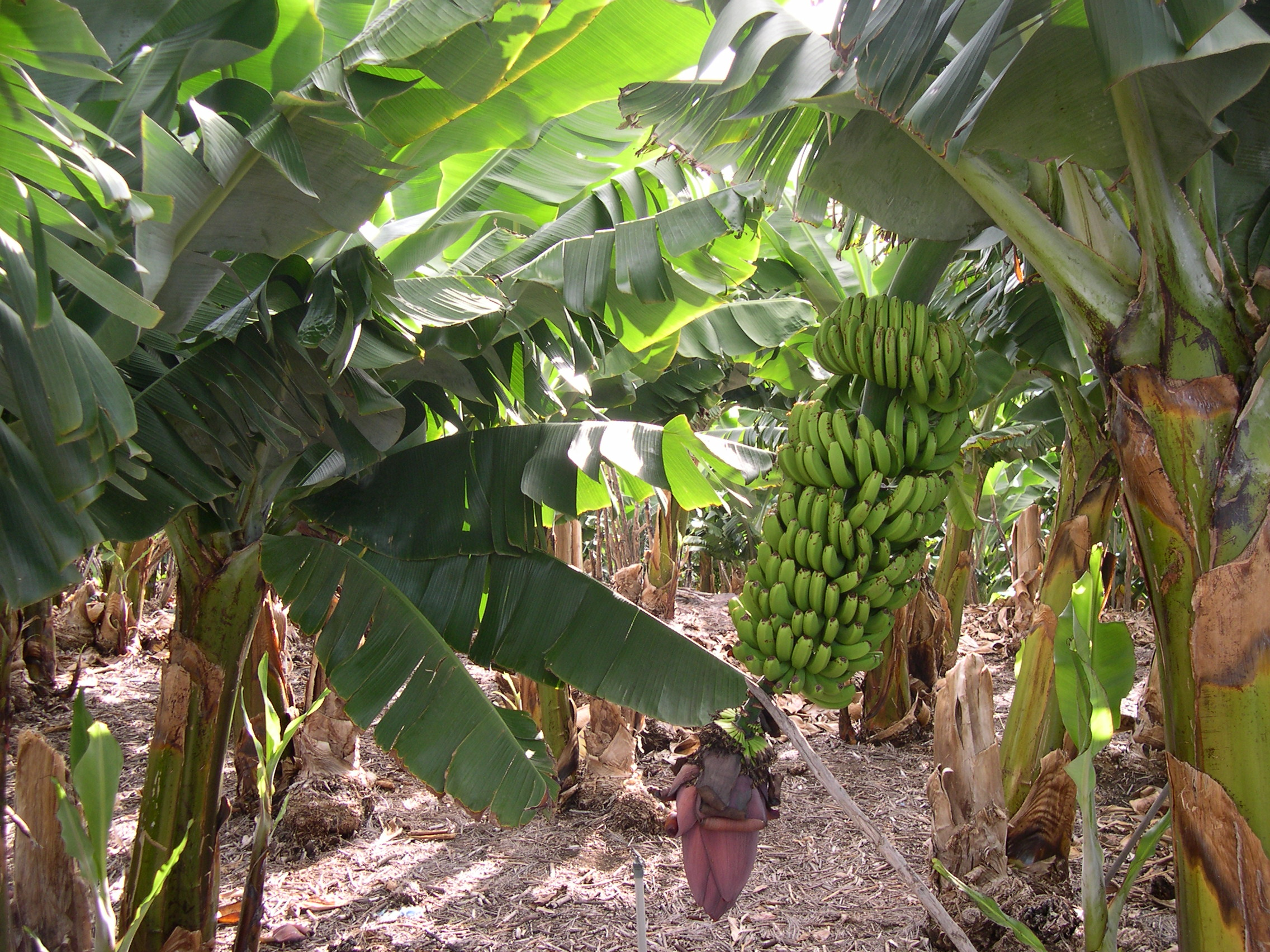 Plantation banana La Palma